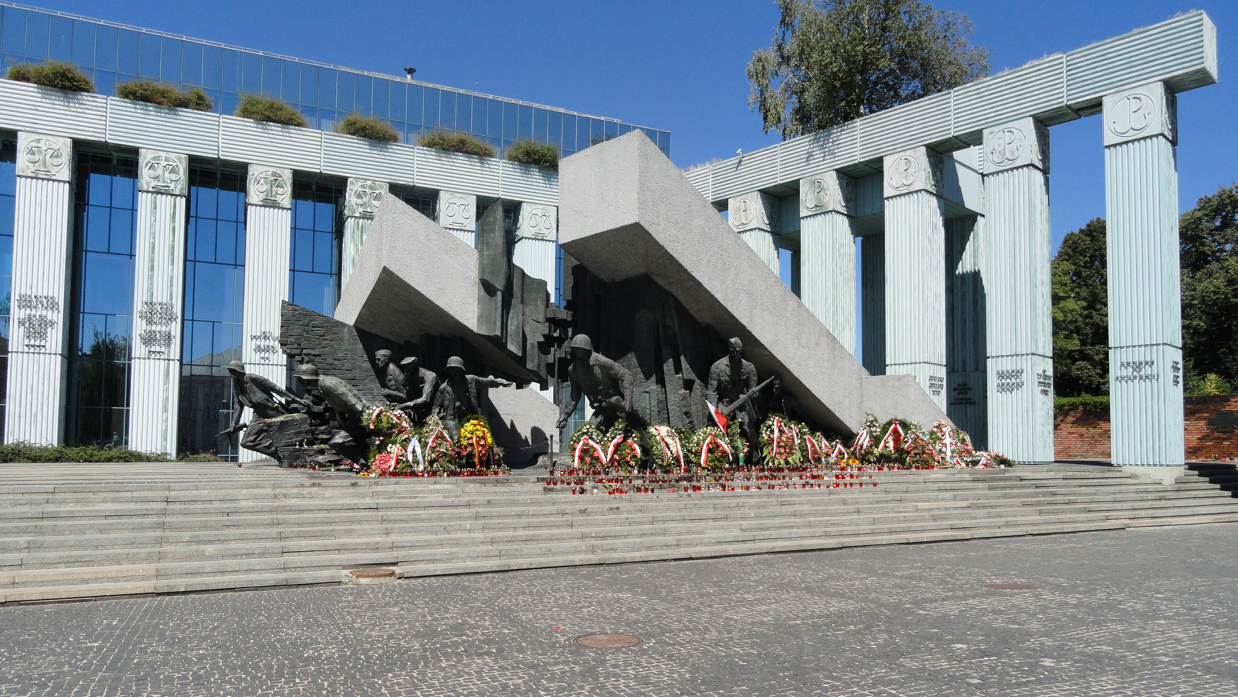 Pomnik Powstania Warszawskiego w Warszawie